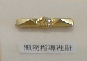 服務指導准尉記章（甲）で退官時に記念品の盾（付准尉経験者への）として貰ったものから抜粋